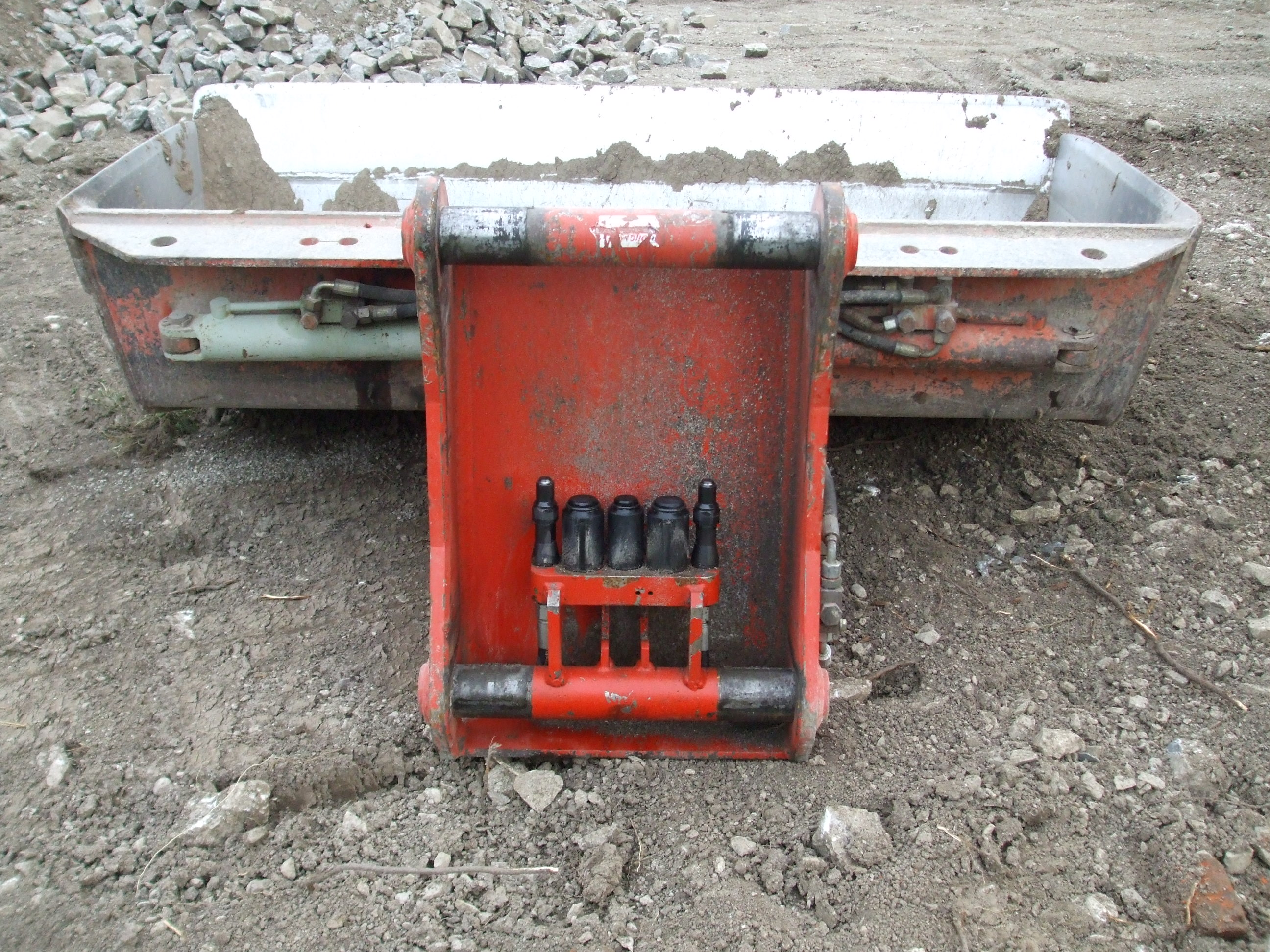 Hydraulische Schnellspannanschlüsse an einer Baggerschaufel